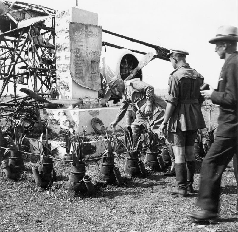 Cippo in ricordo delle vittime dell'eccidio di Lechemti